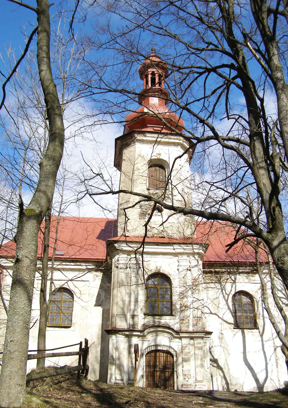 Andělská Hora - bývalý barokní poutní kostel sv. Anny, postavený v 18. století